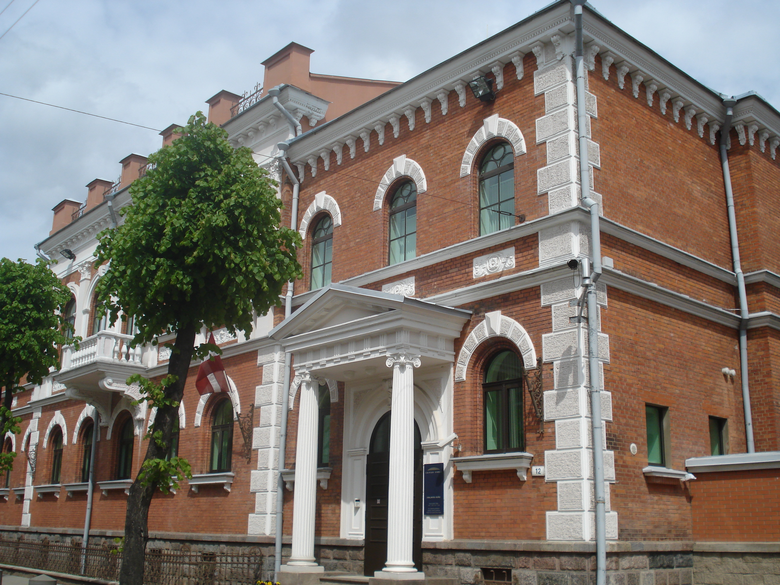 The neoclassiacal building in Daugavpils. Ģimnāzijas iela 12. Now Latvijas Banka, Daugavpils filiāle